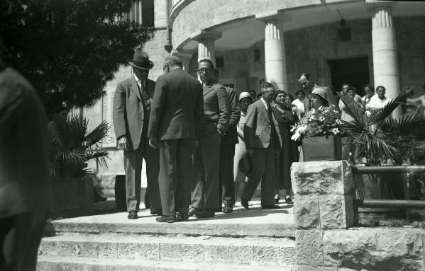 אדמונד אלנבי משוחח עם ד"ר אברהם רוזנטל וחיים ארלוזורוב במהלך ביקורו בסנטוריום ארזה.